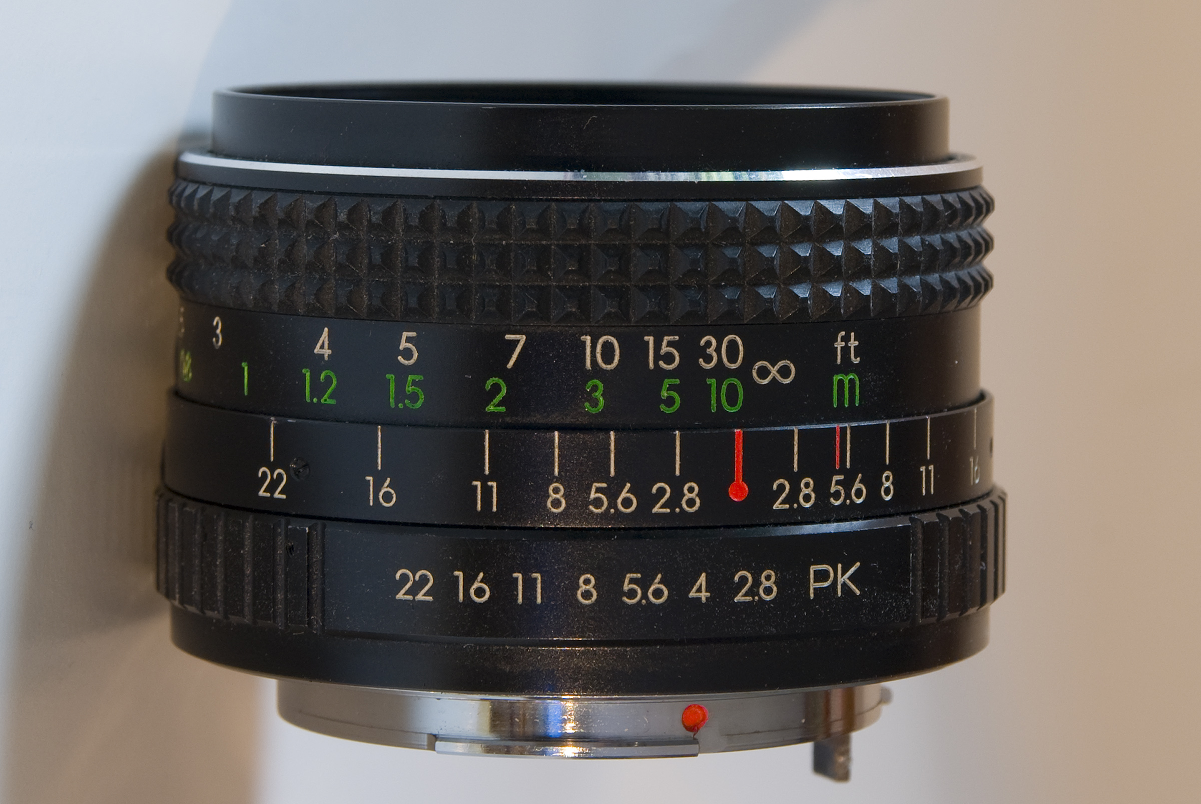 Objektiv "Revuenon", Herstellerfirma ist "Enna Werk". 1:2,8 ; Brennweite 28mm. MF für Pentax Kameras. Seitenansicht.